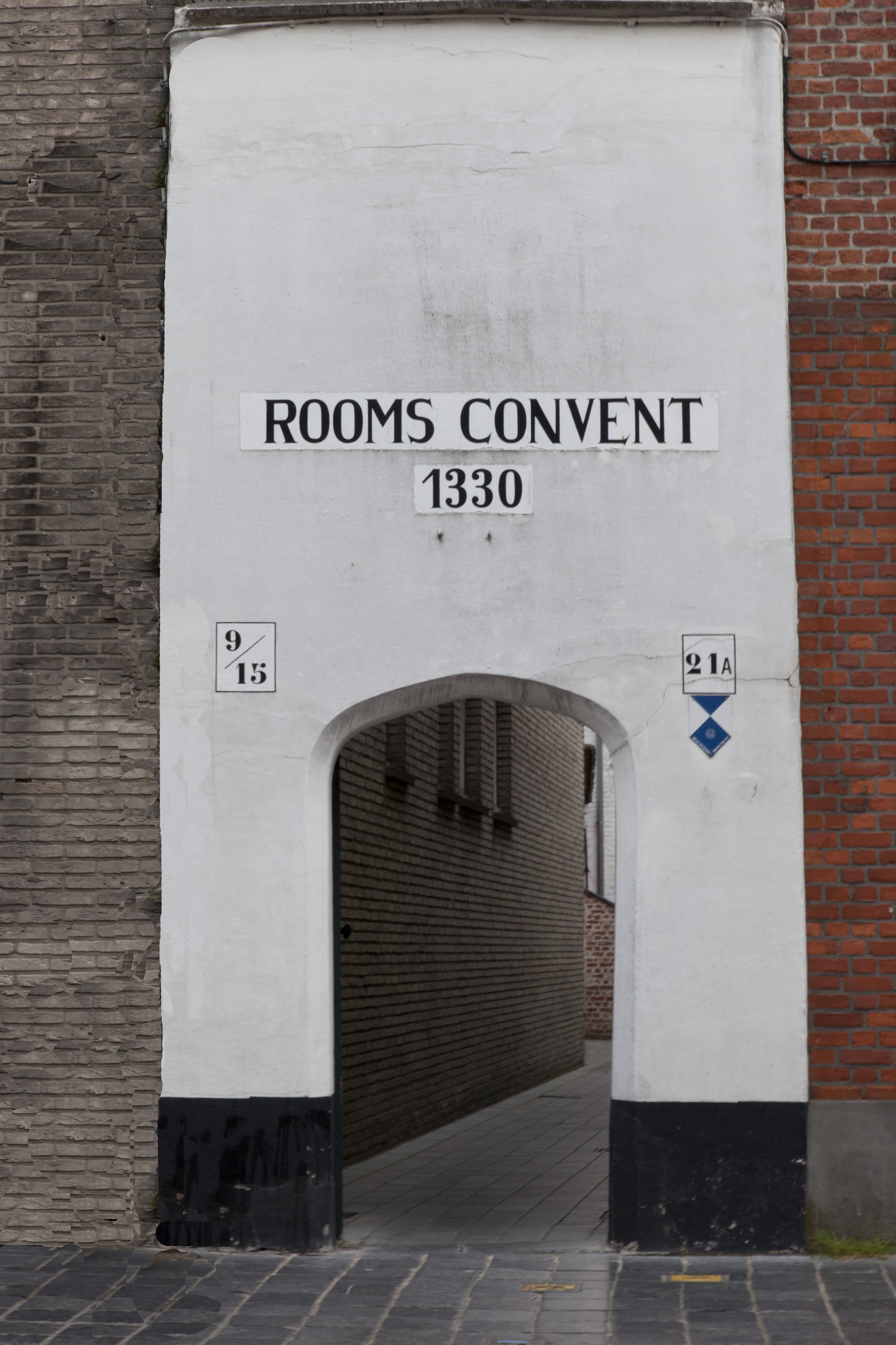 Brugge - Katelijnestraat 19 - Voormalig godshuis ROOMS CONVENT - 1330 - 81978